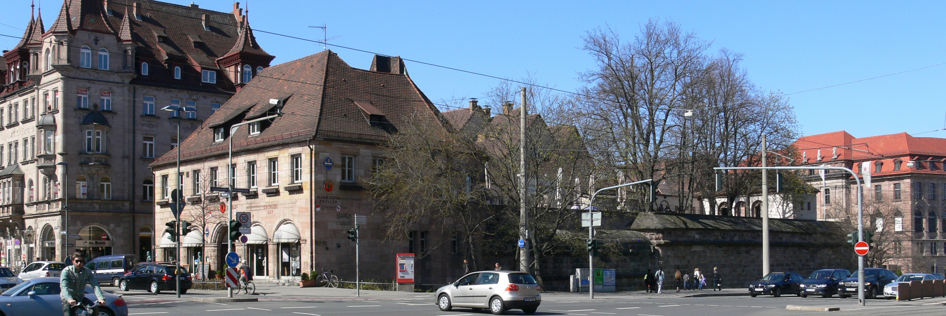 Nürnberg, Wirtshaus „Marientorzwinger“ und Gastterrasse auf dem Marientorzwinger, dahinter Turmstumpf Blaues G und Turm Blaues H)